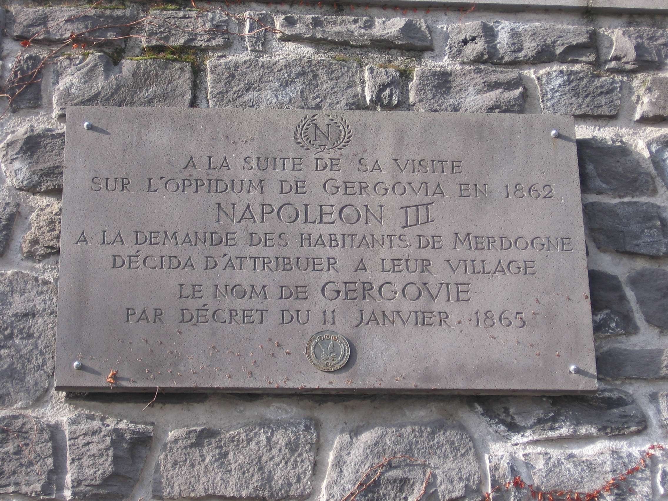 Plaque gravée. «A la suite de sa visite sur l'oppidum de Gergovia en 1862, Napoléon III, à la demande des habitants de Merdogne, décida d'attribuer à leur village le nom de Gergovie, par décret du 11 janvier 1865.»